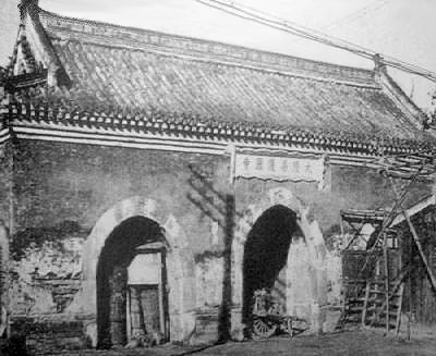 护国寺山门